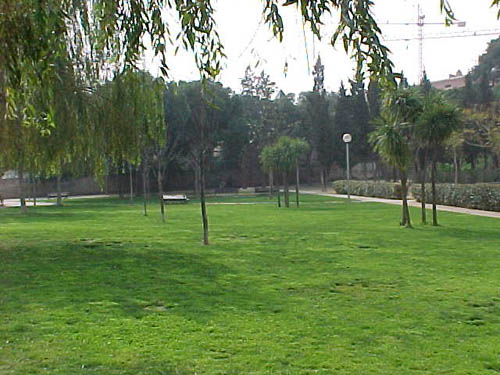 Парк.